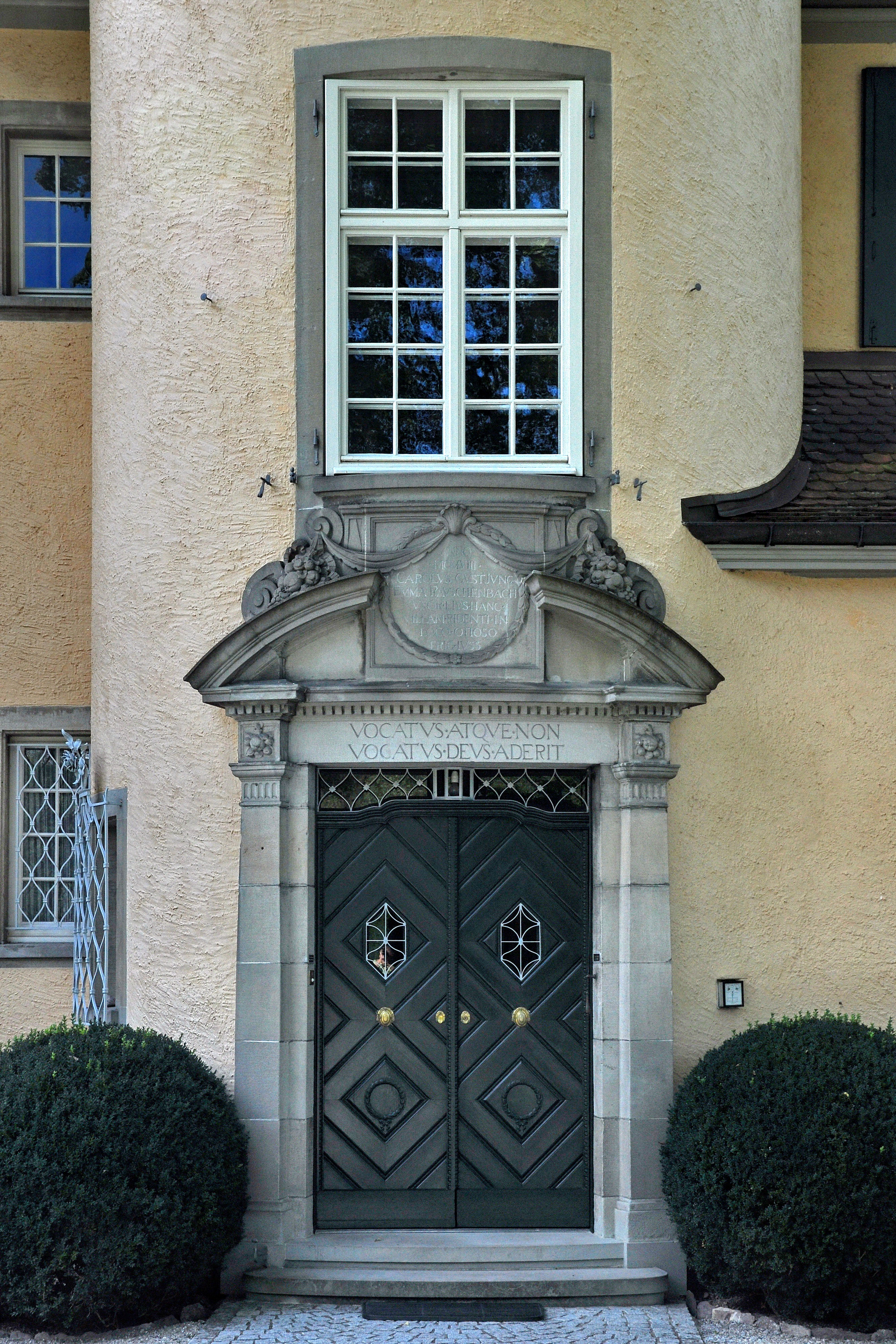 Wohnhaus von C. G. Jung, Seestrasse 228 in Küsnacht (Switzerland)